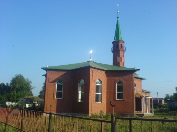 мечеть в миловки